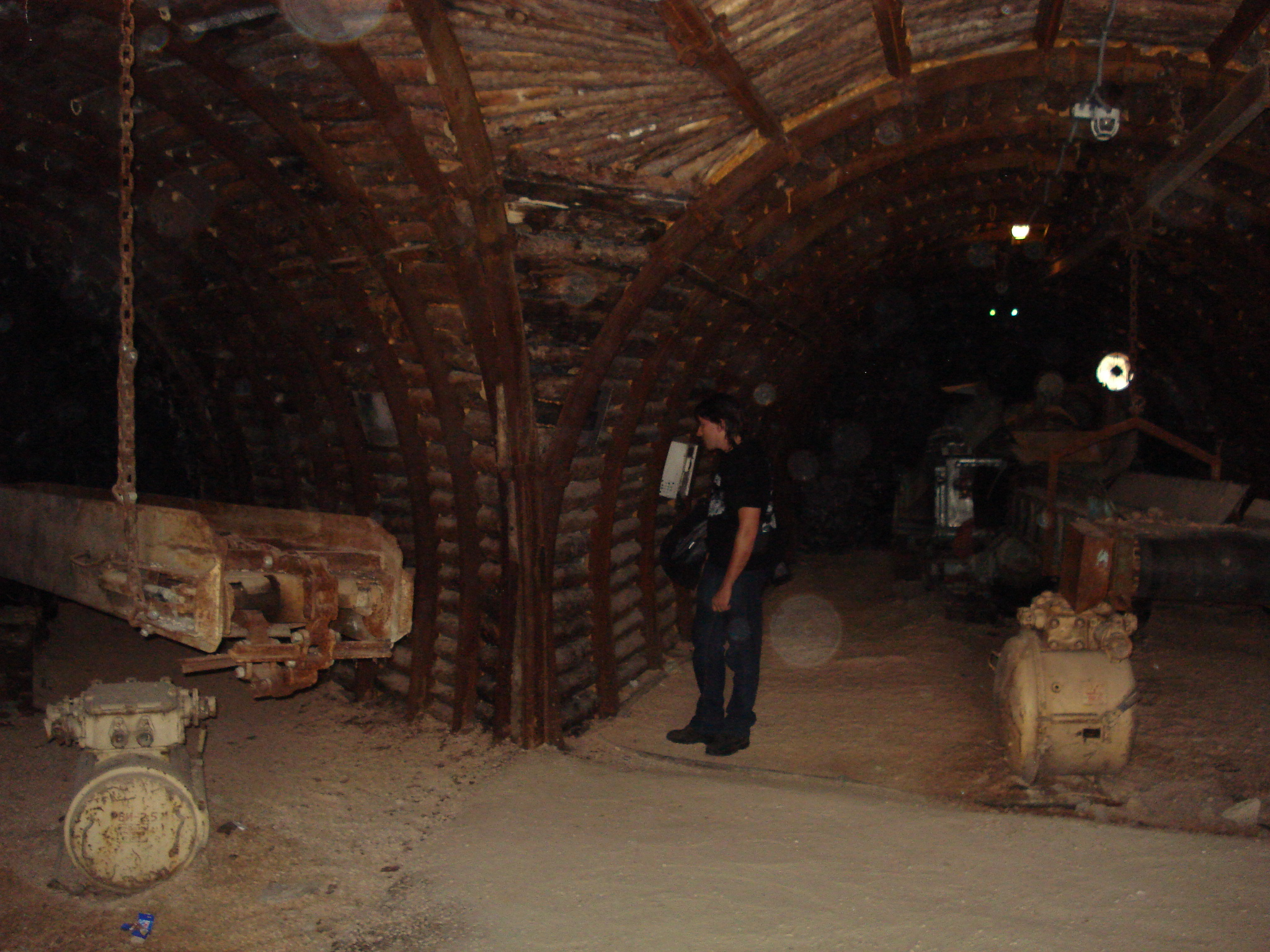 Museo minero de Escucha, mina "Se Verá" (Teruel, Aragón)MUSEU DE LES MINES d' ESCUCHA